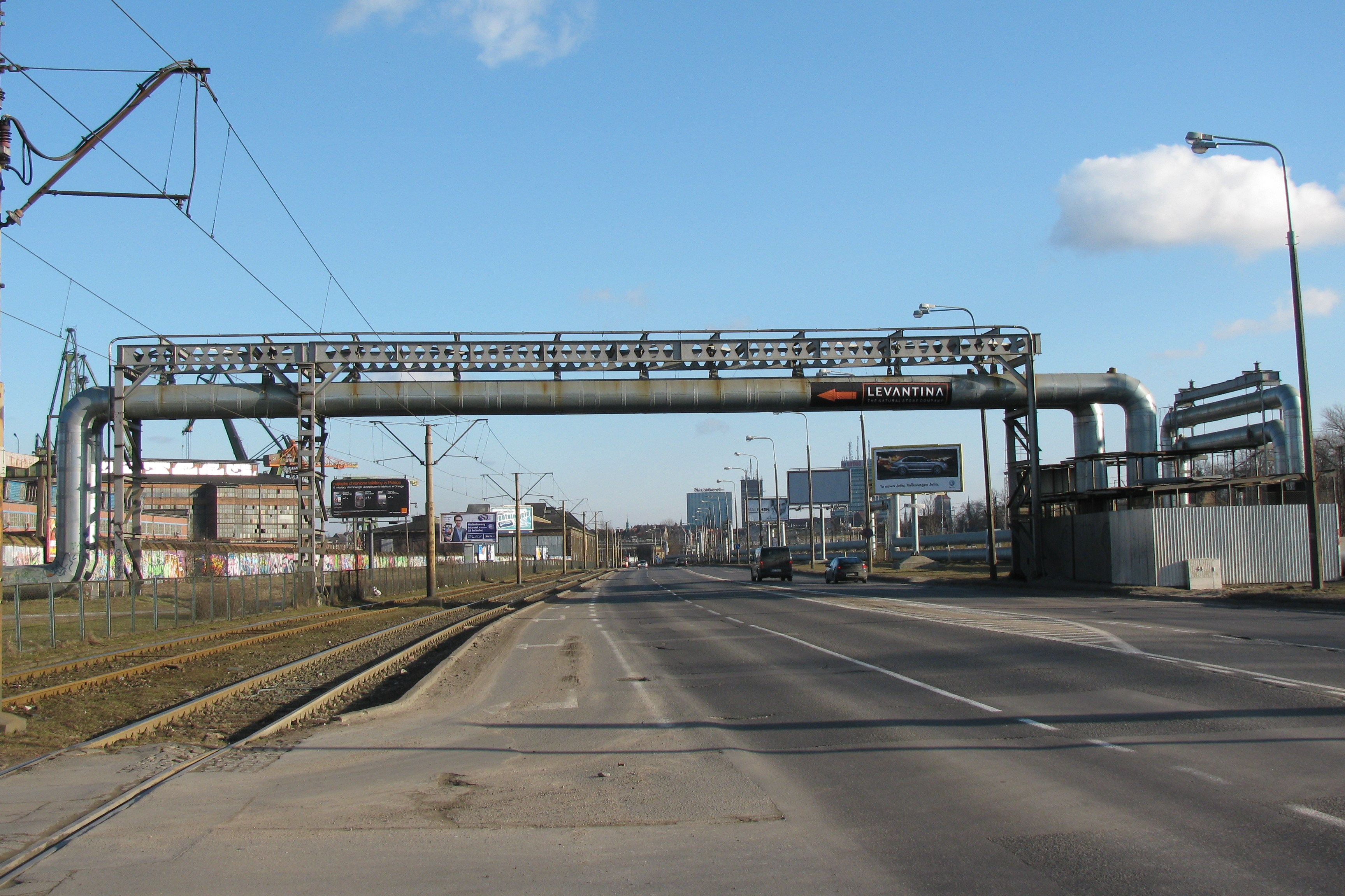 Ulica Jana z Kolna w Gdańsku, widok w kierunku południowym.